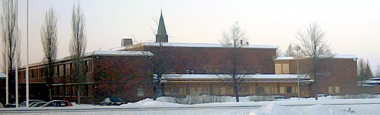 Parempi kuva Kauhavan koulukeskuksesta